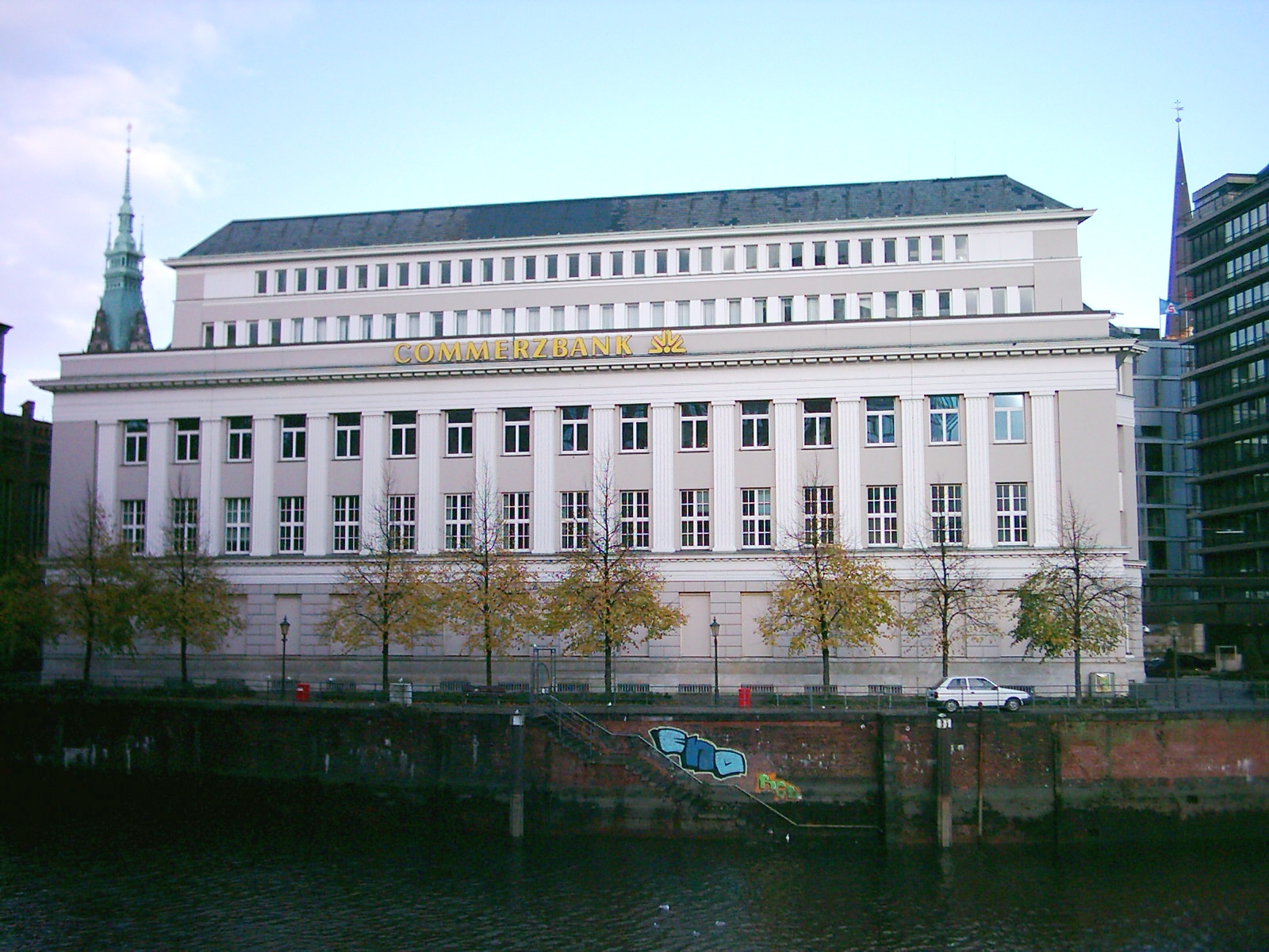 Commerzbank Hamburg-Altstadt.